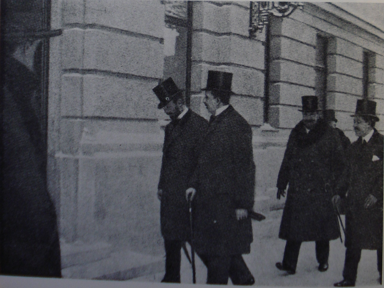 grof Tisza ulazi u sbaornicu s banom Skerleczom i grofom Pejačevićem